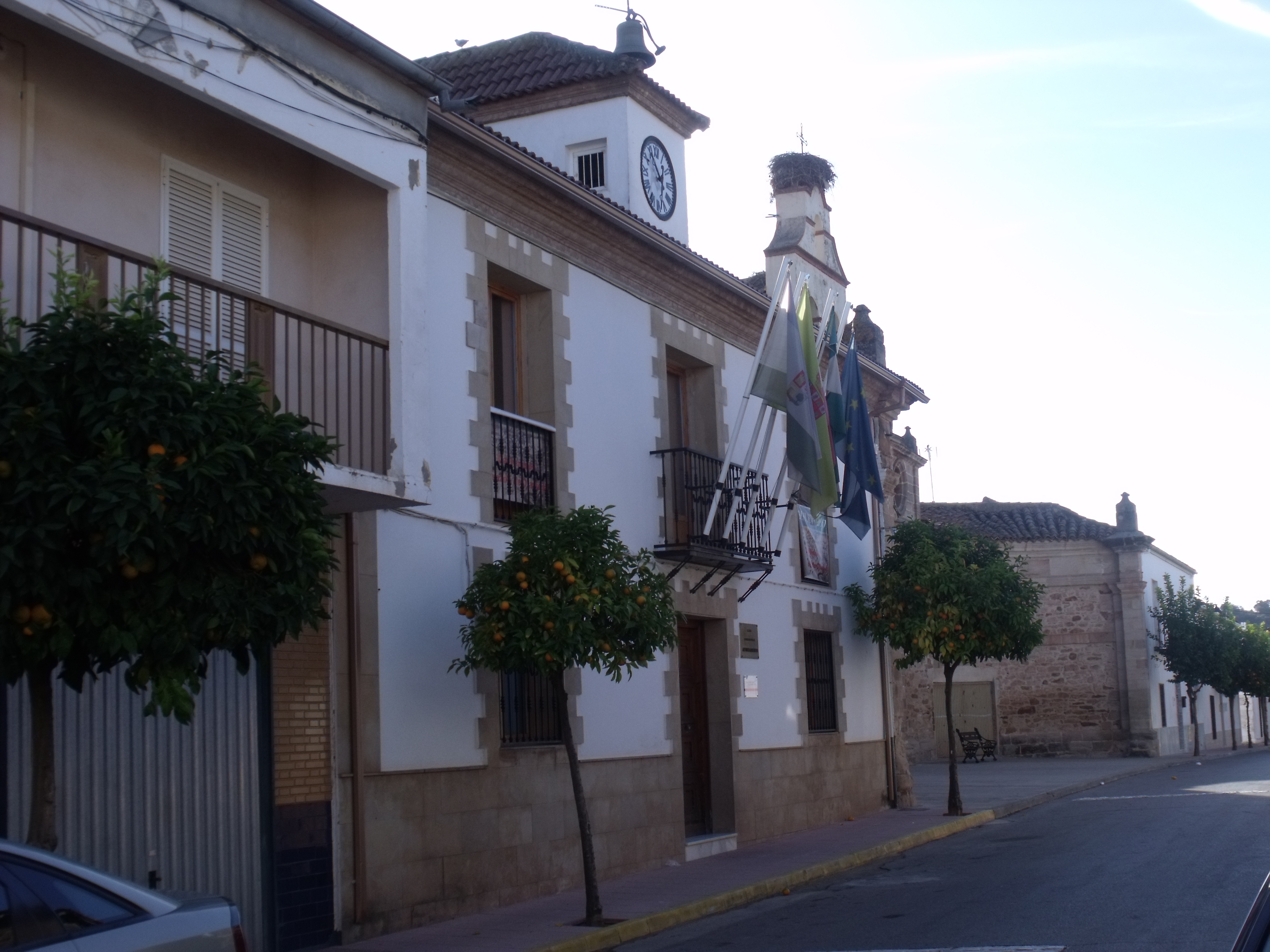 Ayuntamiento